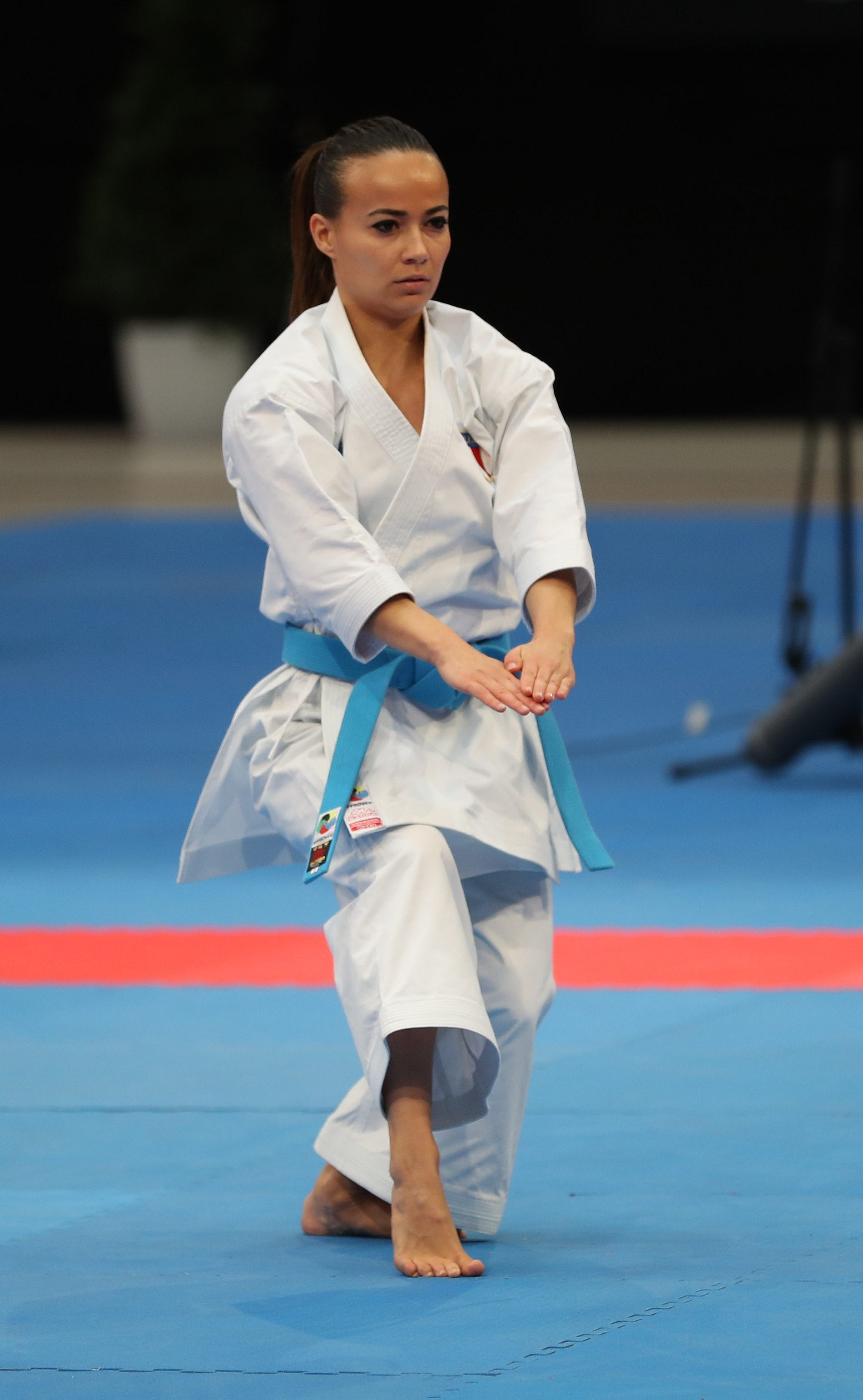 Female Kata am 16. September 2018 in der Karate1 Premier League Berlin 2018. Abgebildet: Viviana Bottaro.